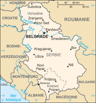 Carte de la Serbie, 2008.